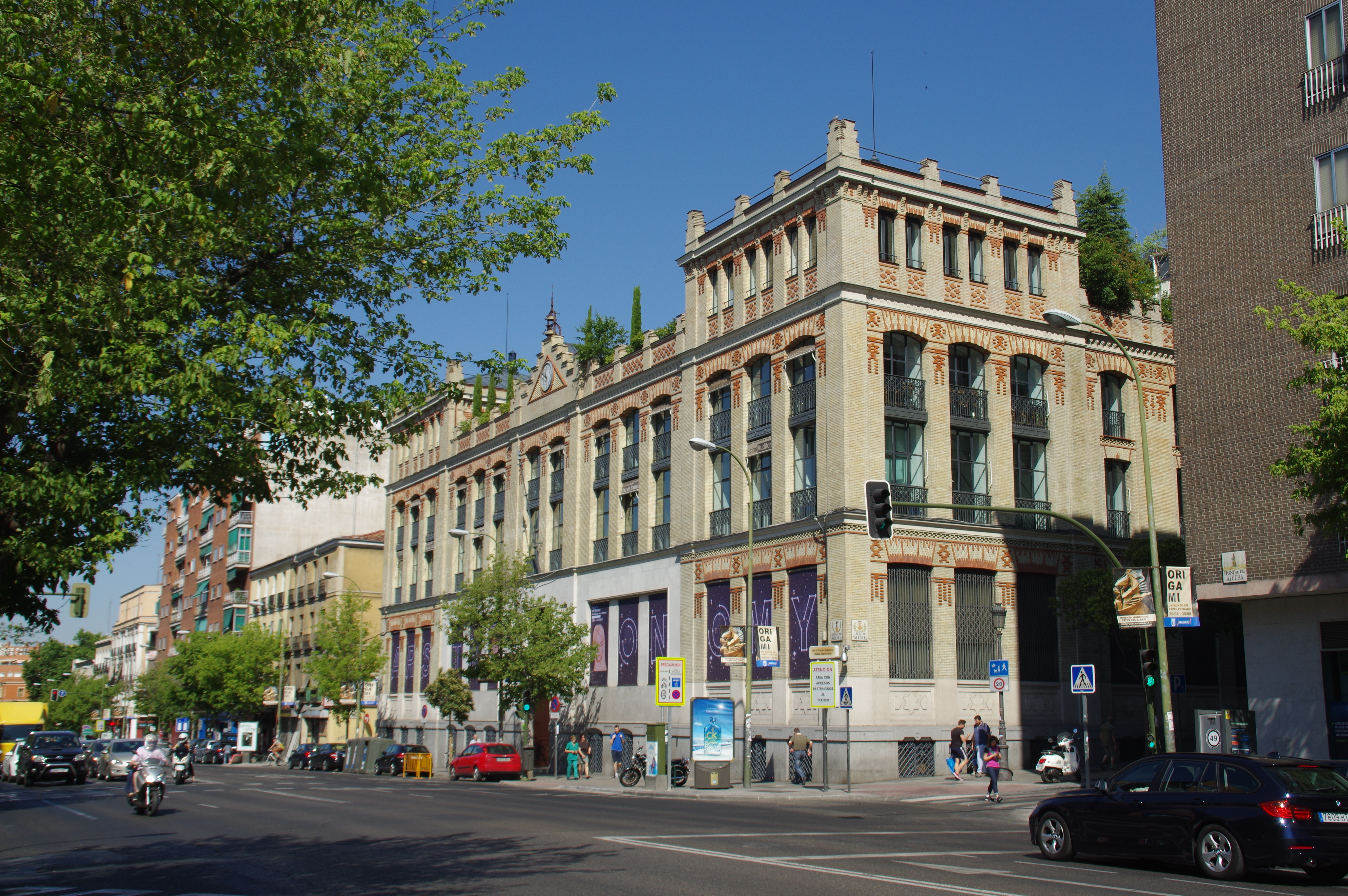 MADRID-CENTRO_EDIFICIO NEO-MUDEJAR VIEW in Ð 6K